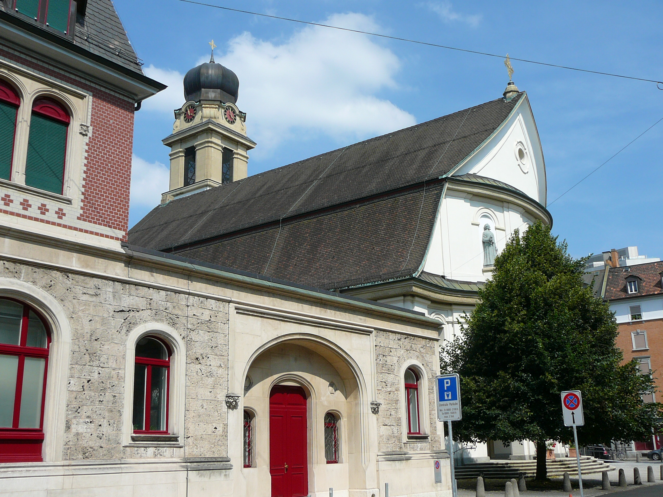 Römisch-katholische Kirche St. Josef Zürich-Industriequartier, Blick von der Heinrichstrasse her